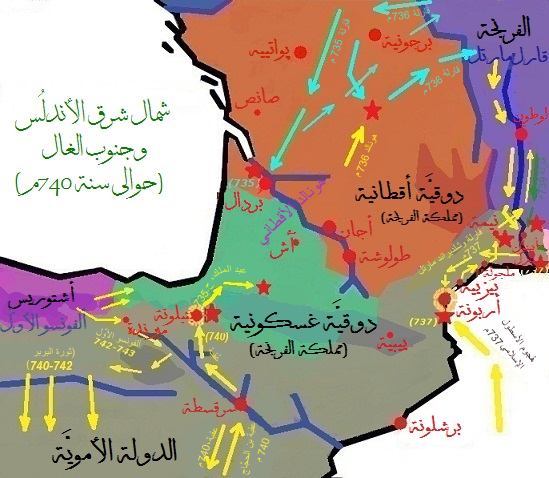 شمال شرق الأندلُس وجنوب غرب الغال في المنطقة المُحيطة بِجبال البرتات حوالي سنة 740م. تُظهرُ هذه الخريطة الحملات العسكريَّة التي كانت دائرة في تلك البلاد حينذاك، والأوضاع الجيوسياسيَّة.